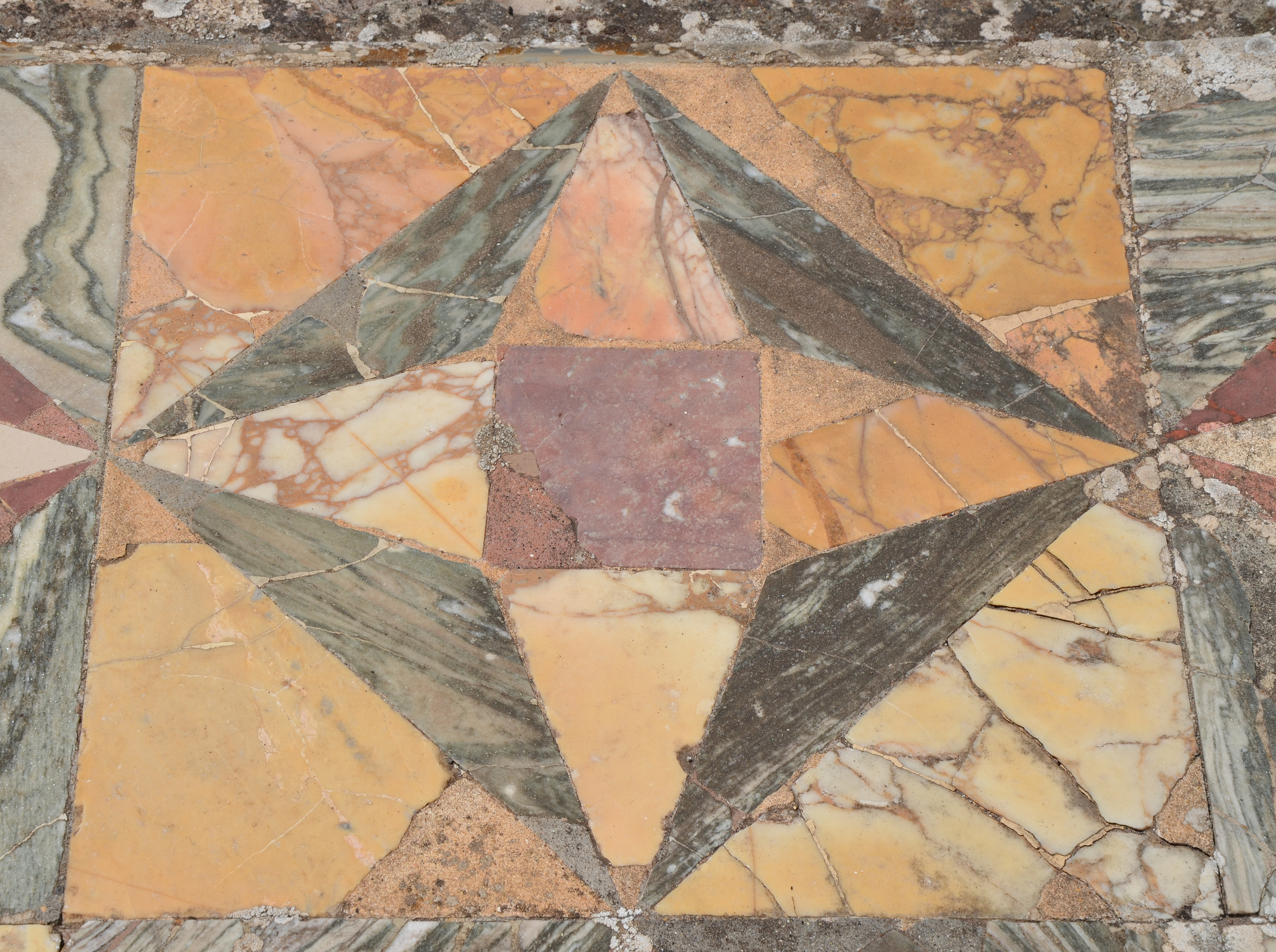 Opus sectile pavement, Hadrian's Villa, Tivoli